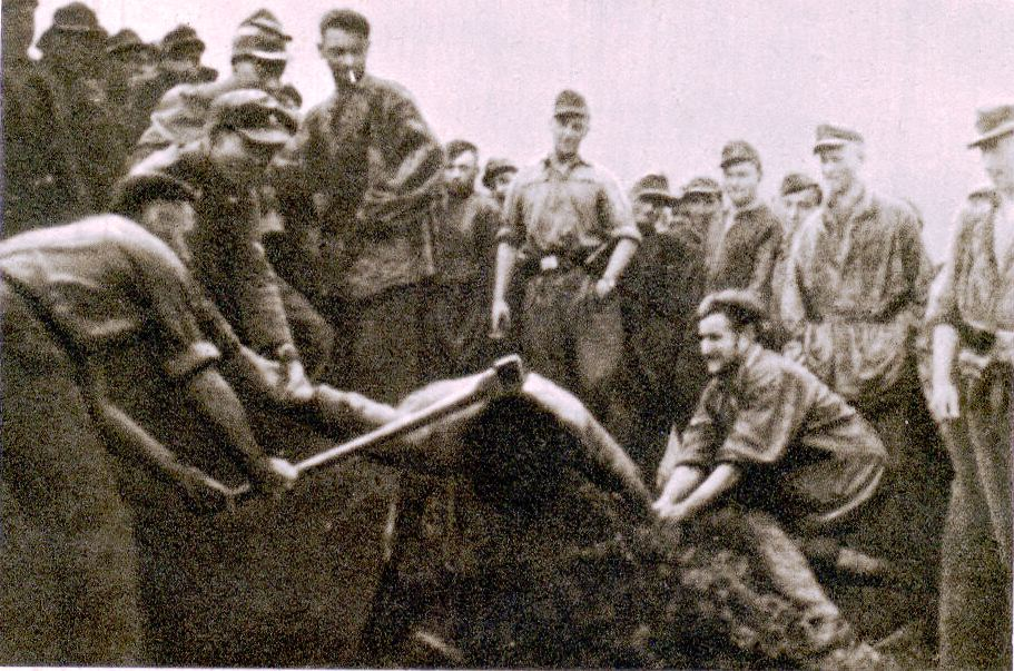 Obglavljanje partizana v Renčah pri Gorici